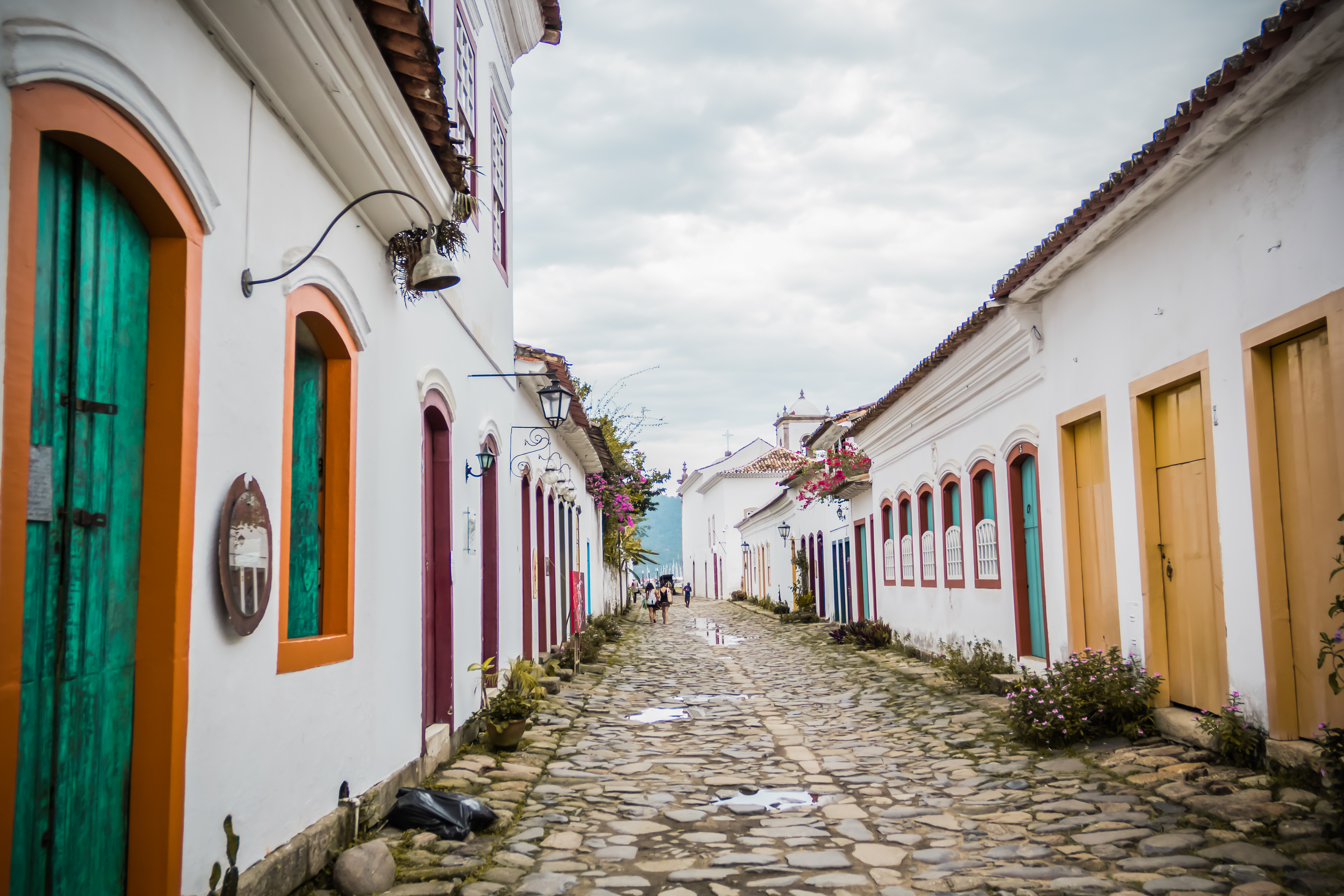 Conjunto arquitetônico e paisagístico da cidade de Paraty e, separadamente, o edifício da Santa Casa